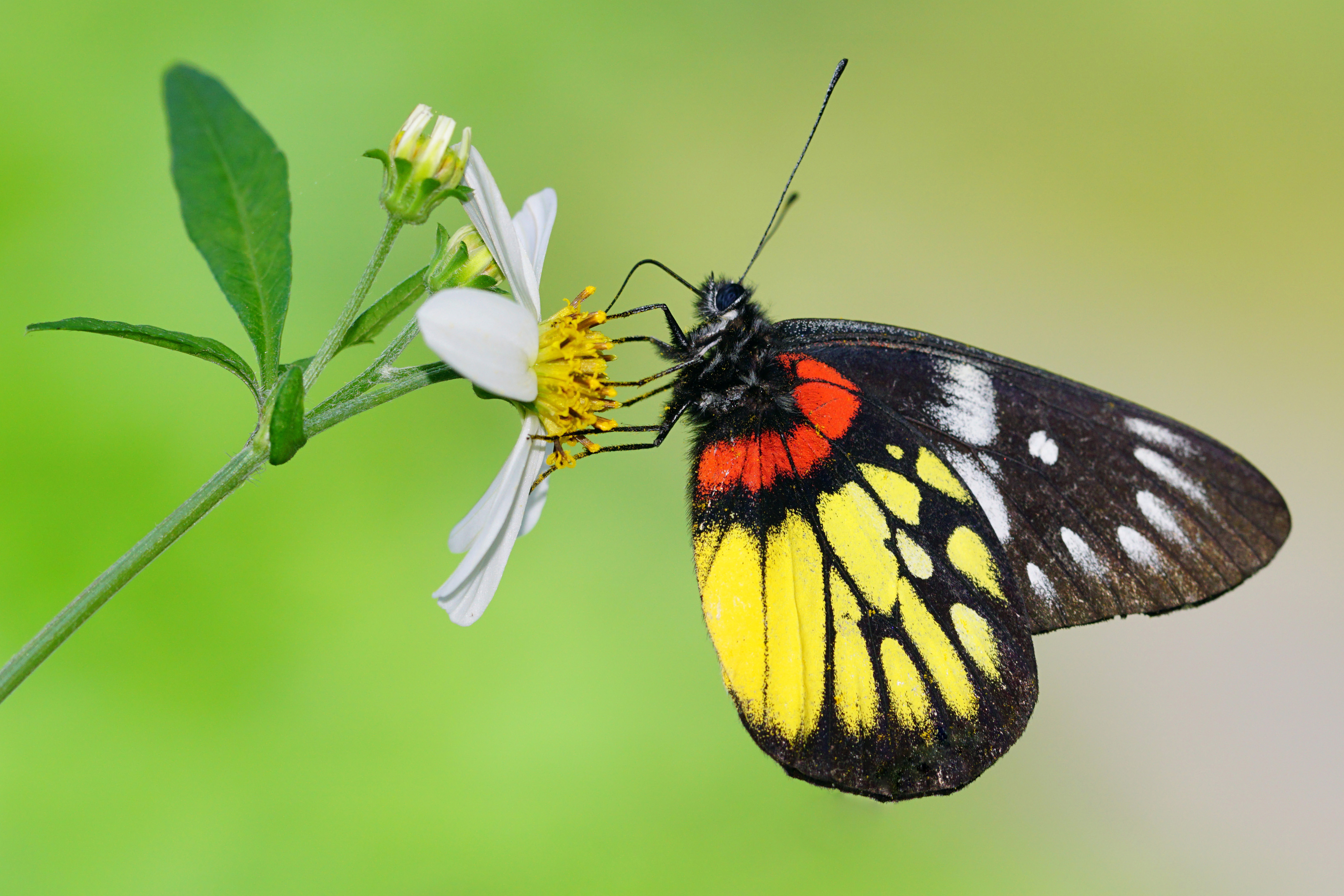 豔粉蝶 Delias pasithoe curasena